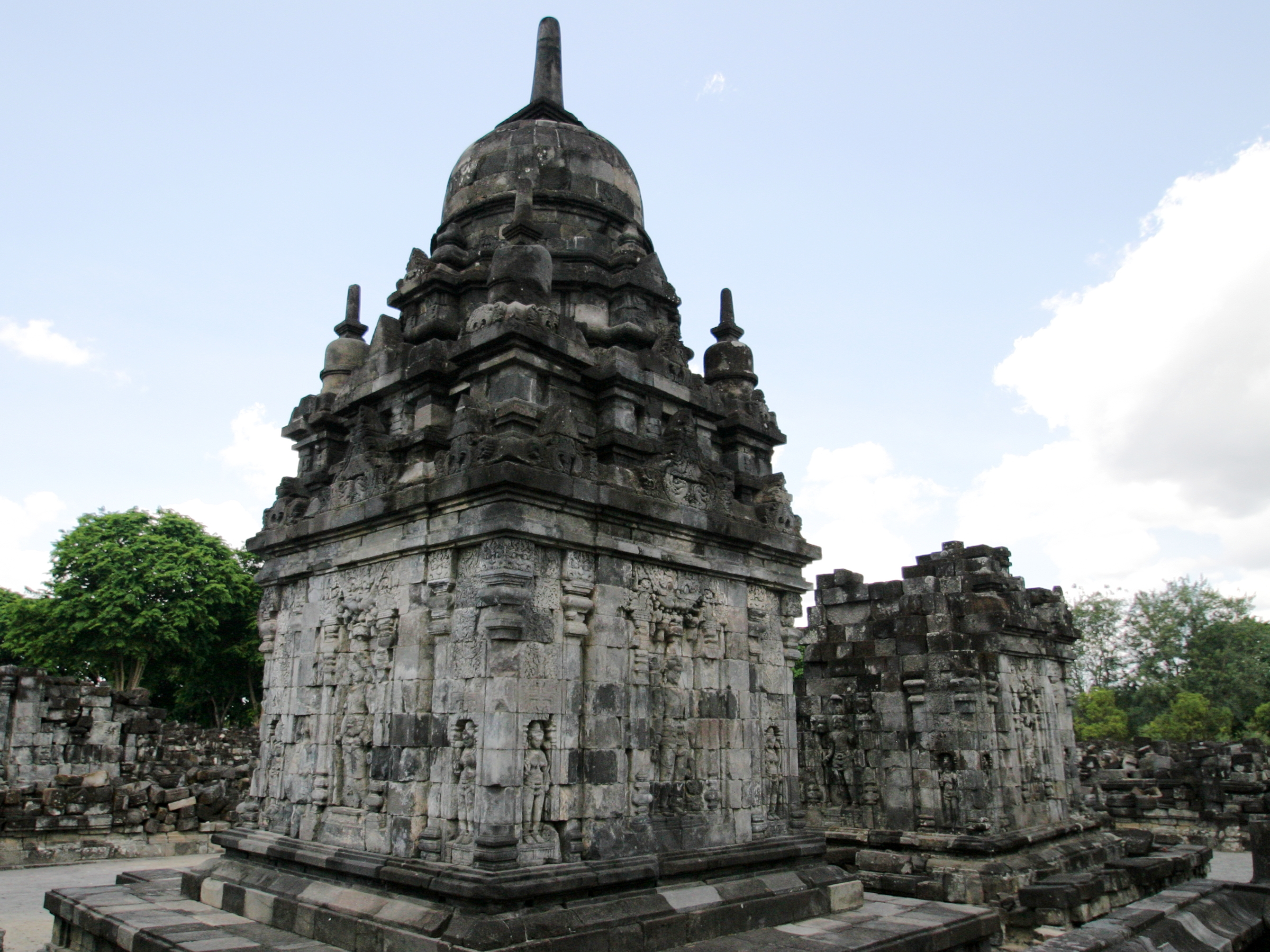 240基が配列されたプルワラ小祠堂の壁体部各3面には仏立像などが刻まれている